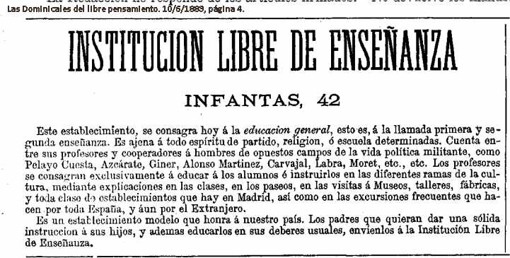 Institución Libre de Enseñanza - Infantas, 42